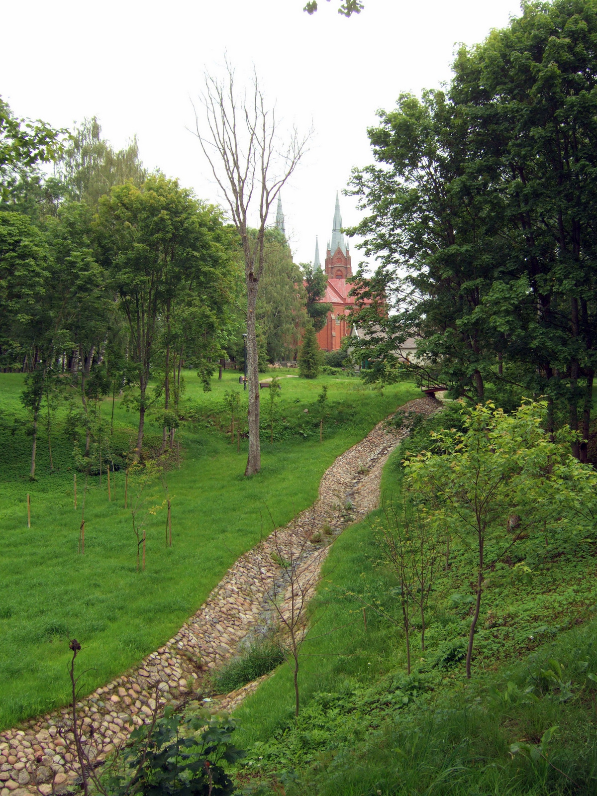 Salantų miesto parko šaltinis